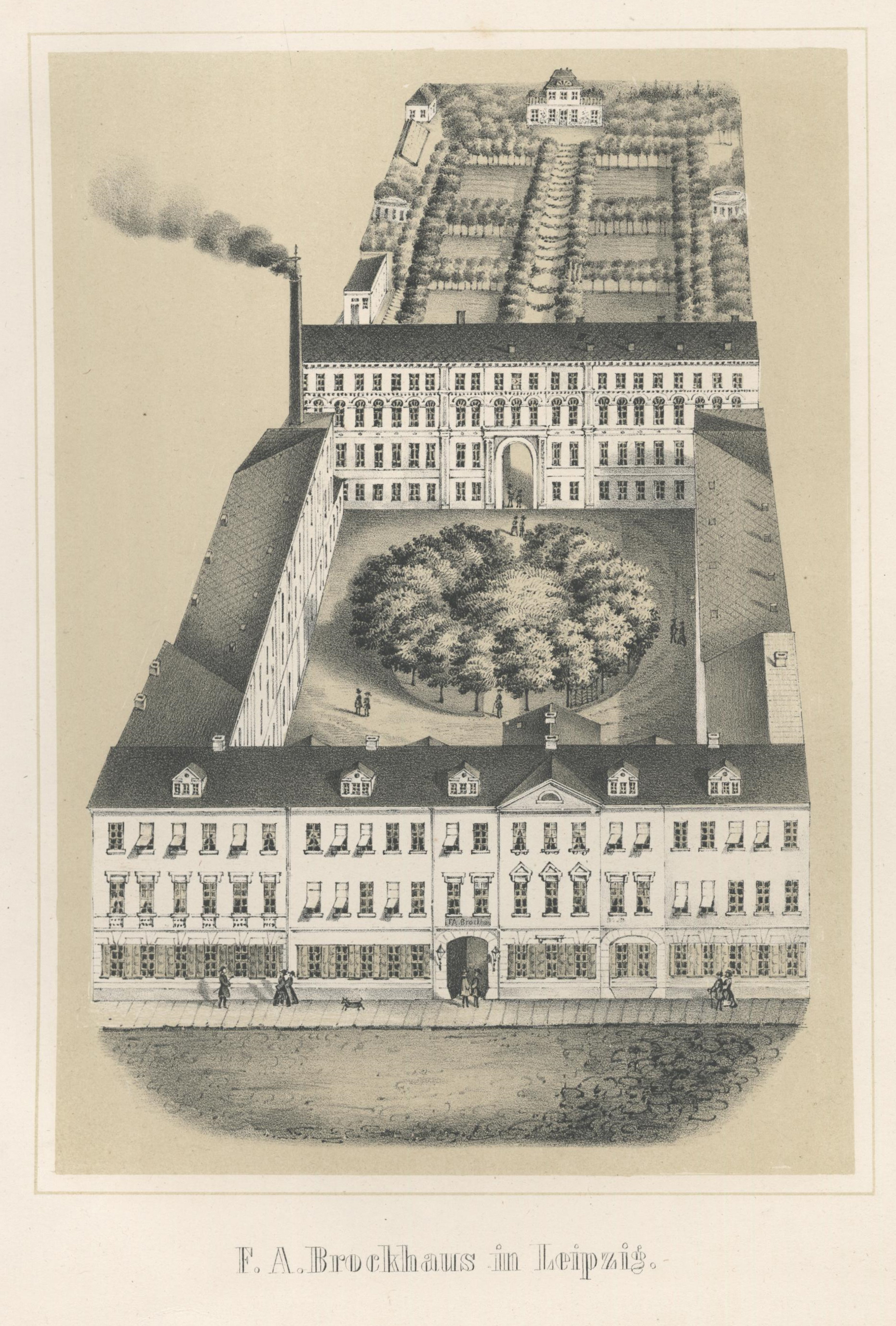 F. A. Brockhaus in Leipzig aus: Album der Sächsischen Industrie Zweiter Band